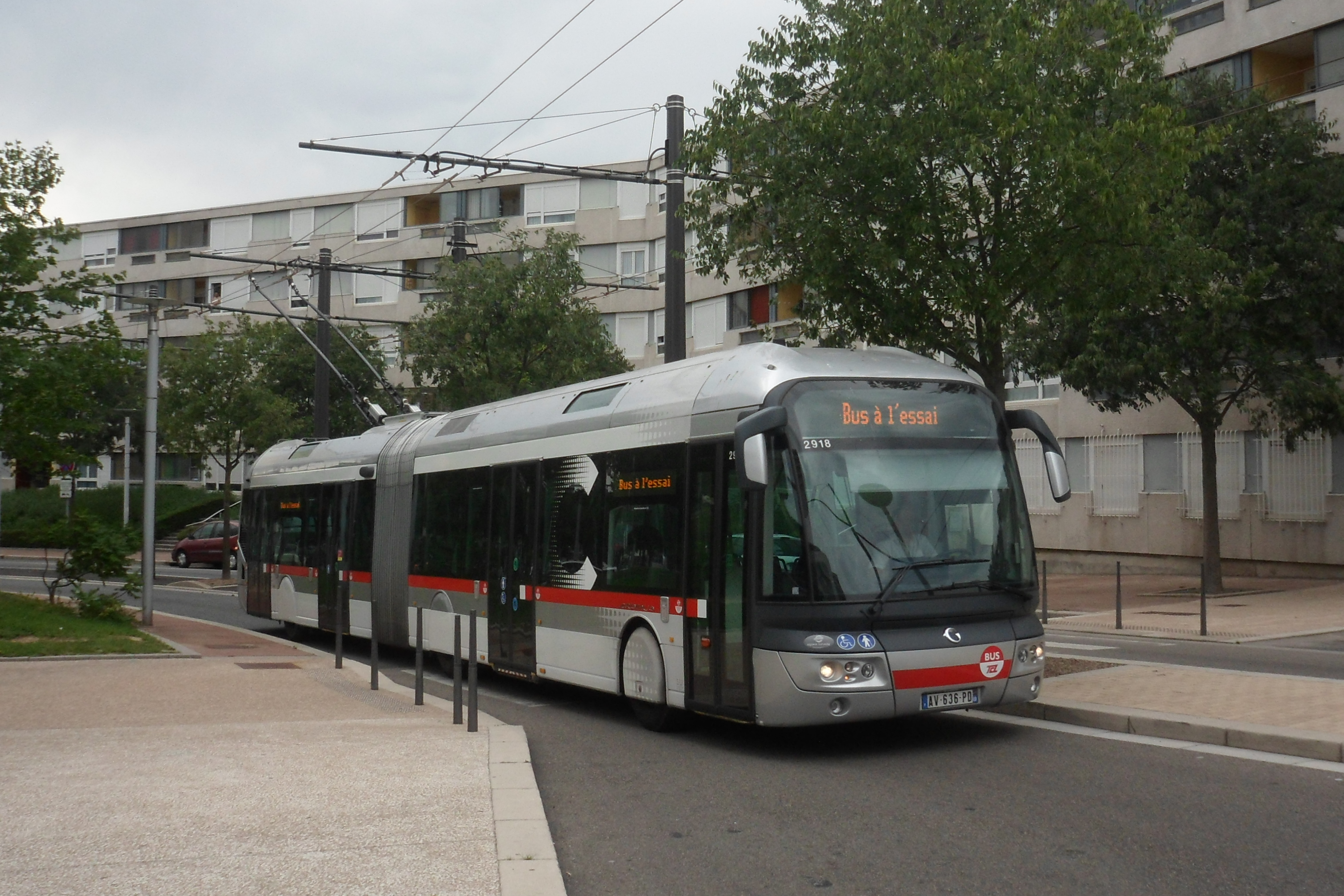 Cristalis ETB18 en tests sur la ligne C2 du réseau lyonnais